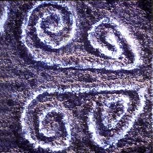 Encontrado en Estado Falcón, Venezuela